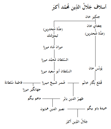 شجرة نسب جلال الدين محمد أكبر ثالث سلاطين مغول الهند.